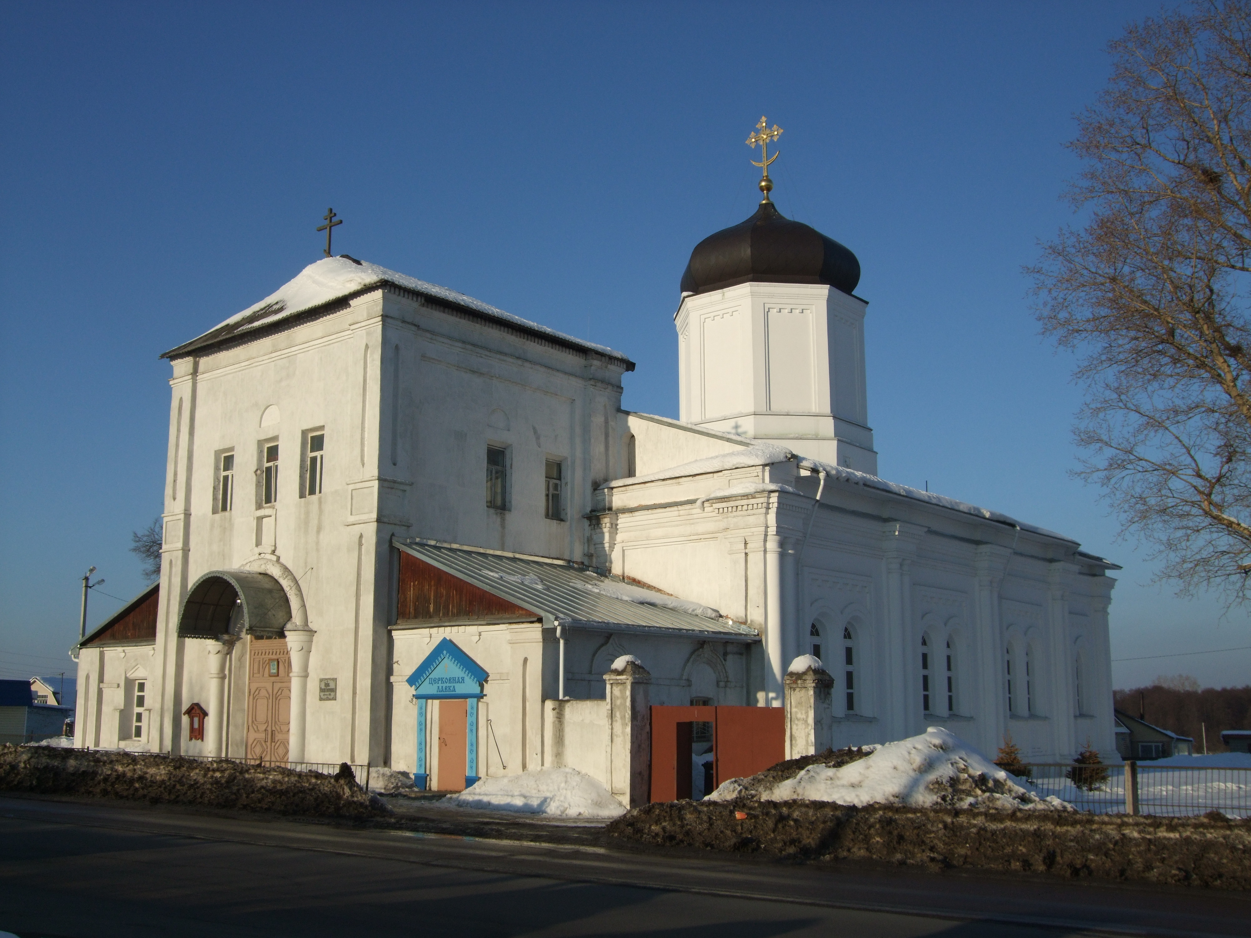 Россия, Московская область, село Гжель. Церковь Успения Пресвятой Богородицы. Год постройки: 1859. Архитектор: Казимир Гриневский. Религия: русское православие.